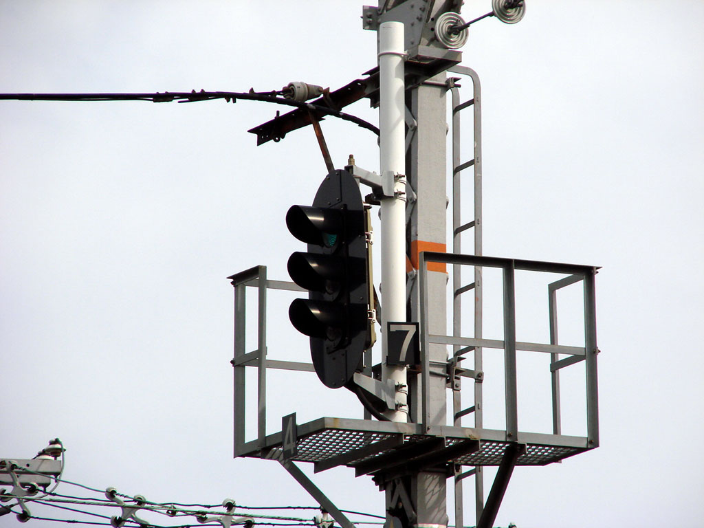 JR西日本 アーバンエリアネットワークエリアでの閉塞信号機